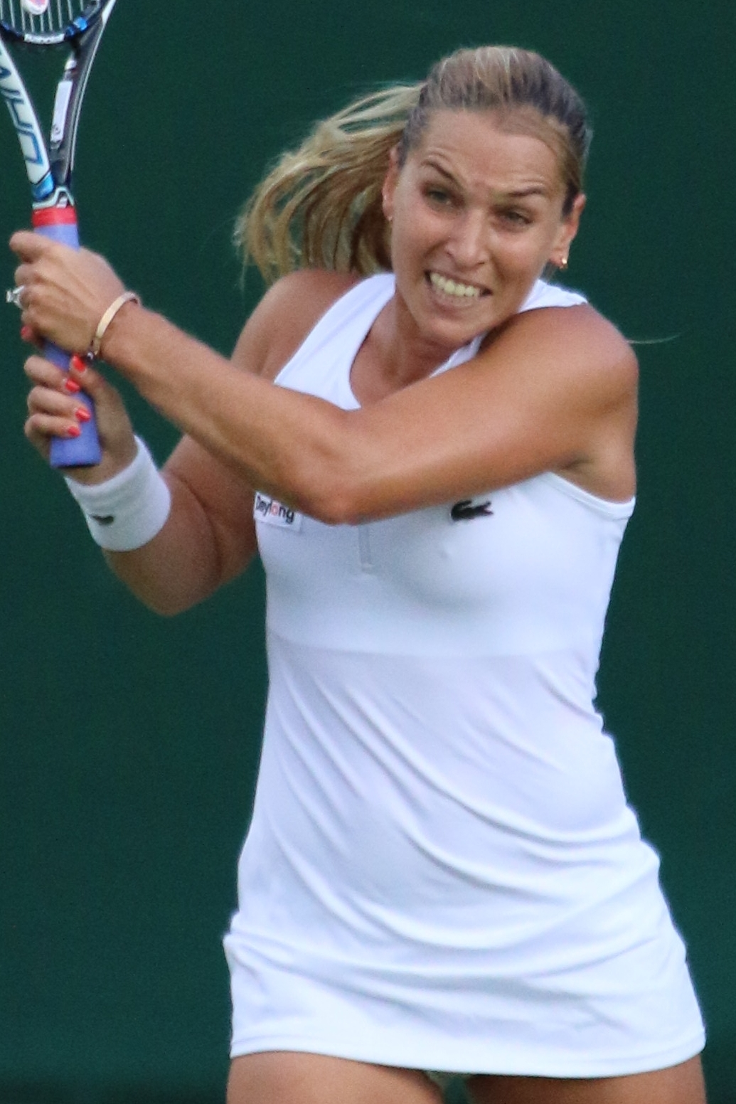 Cibulkova WM16 (4)